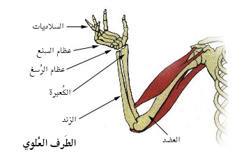 الطُرف العُلوي